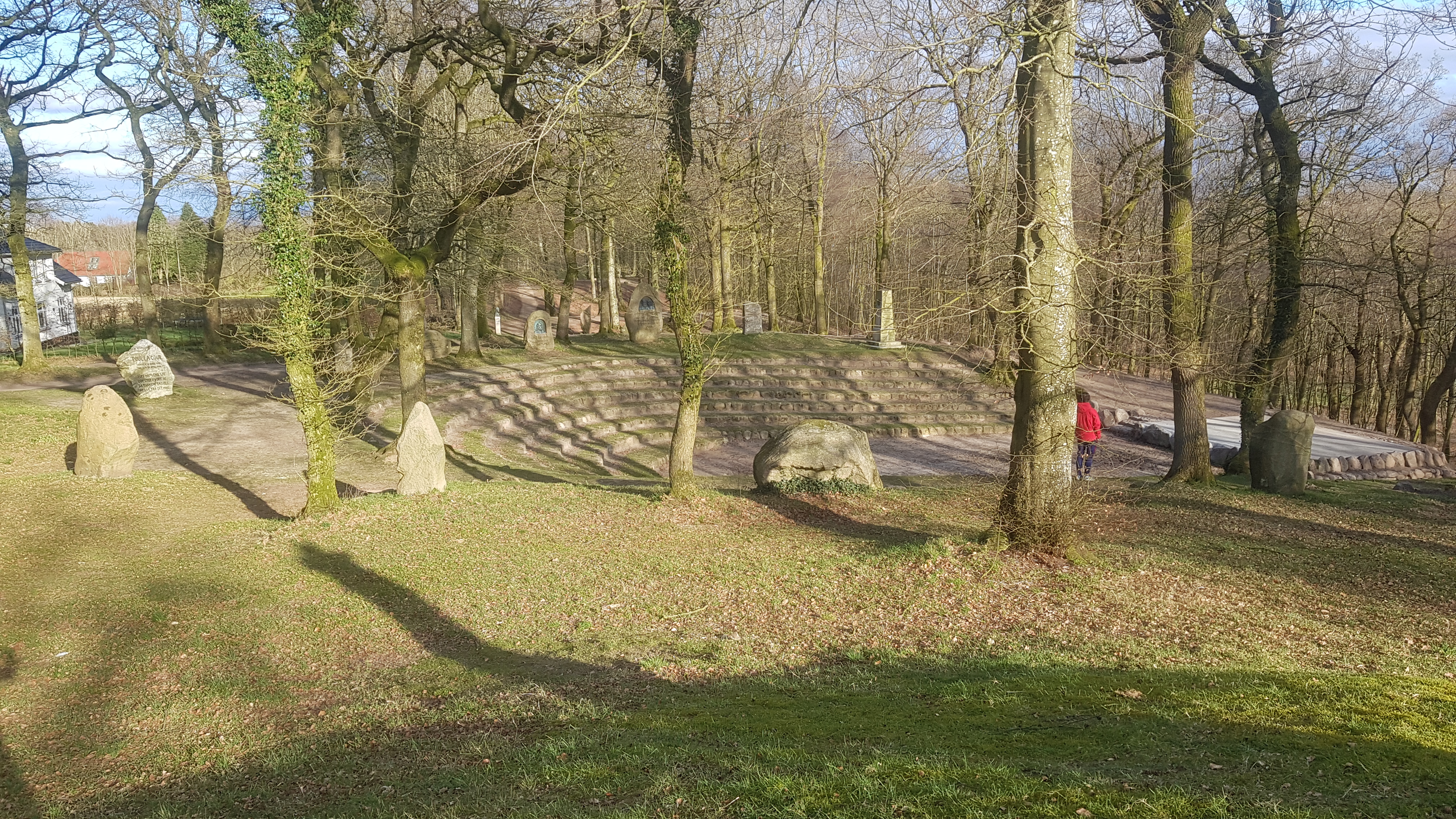 Mødepladsen i Skibelund Krat